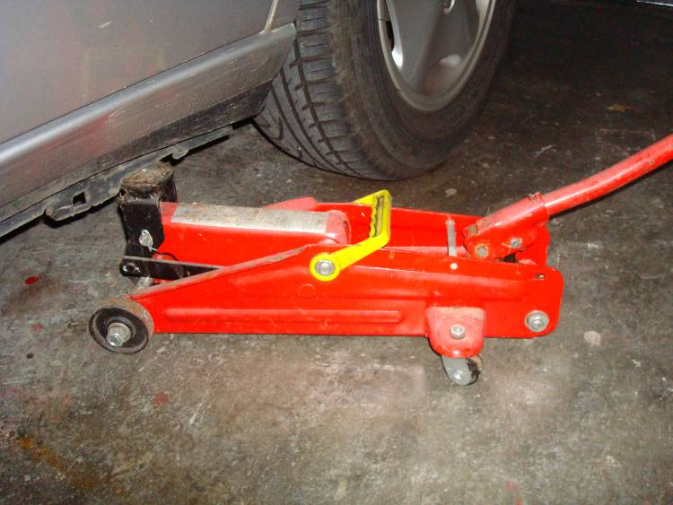 Cric hydraulique pour automobile